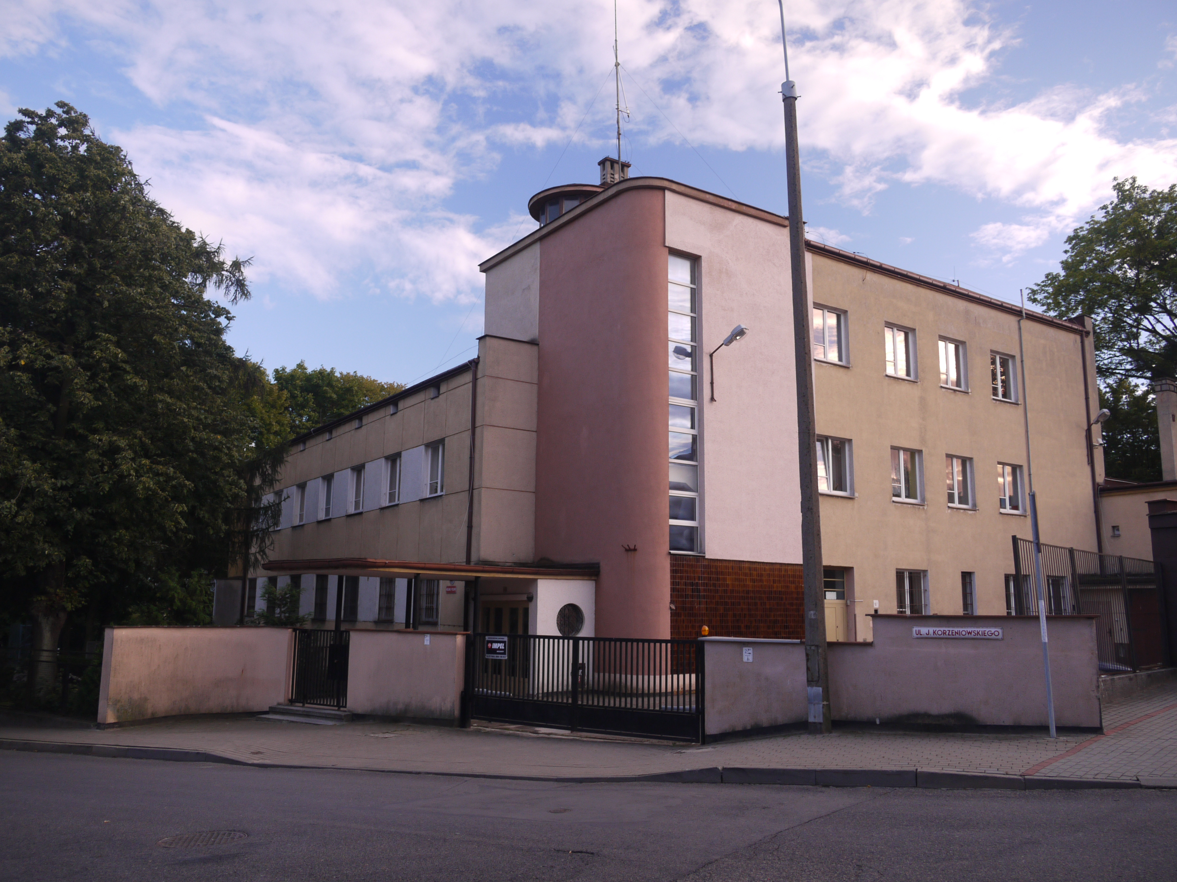 Gdynia, ul. Korzeniowskiego 8/10 - budynek biurowy "Polskarob" wraz z garażem